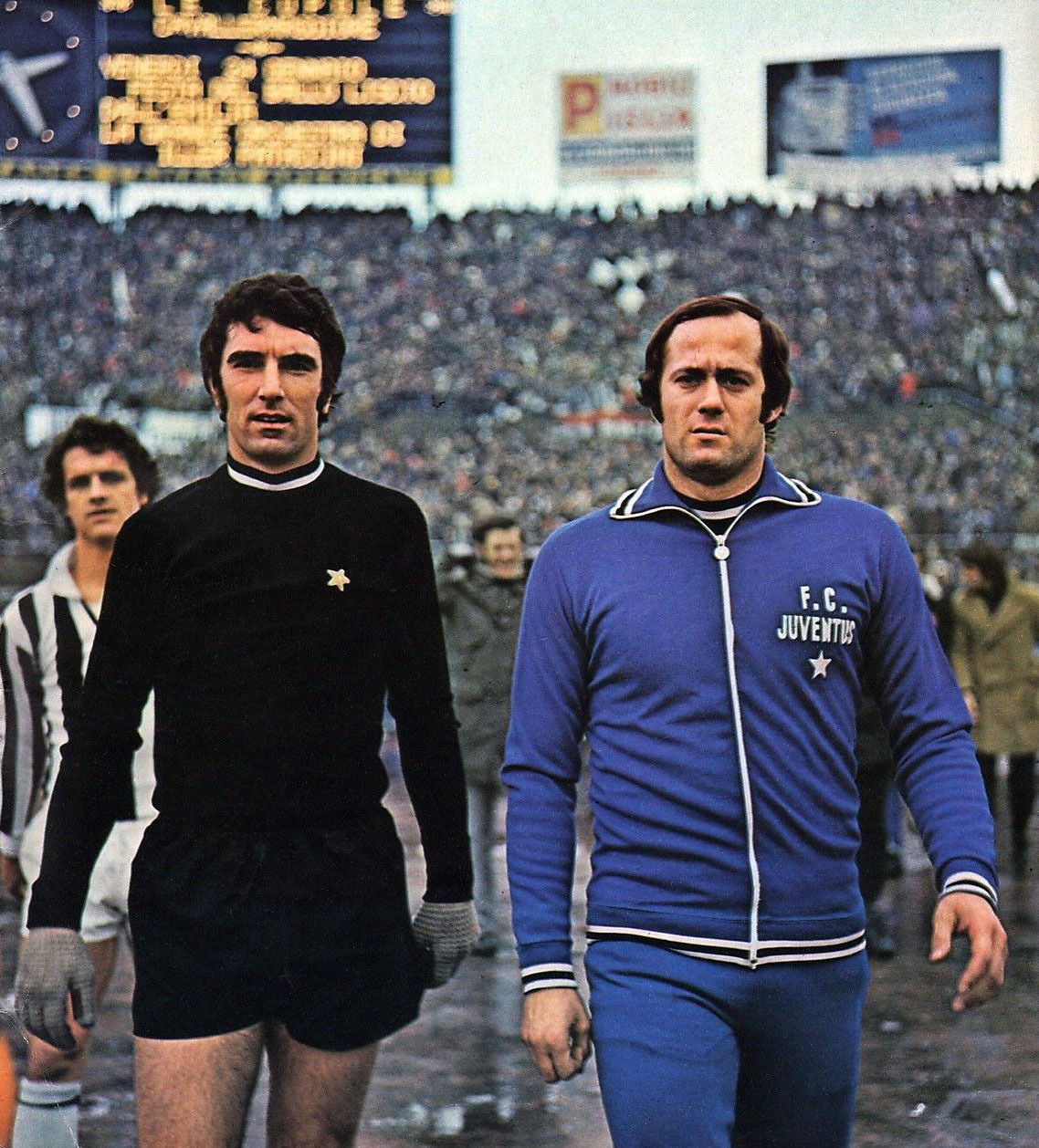 Da sinistra: i due portieri della Juventus per la stagione 1974-75, il titolare Dino Zoff e la riserva Massimo Piloni, allo stadio Comunale di Torino; sullo sfondo, il compagno di squadra Fabio Capello.